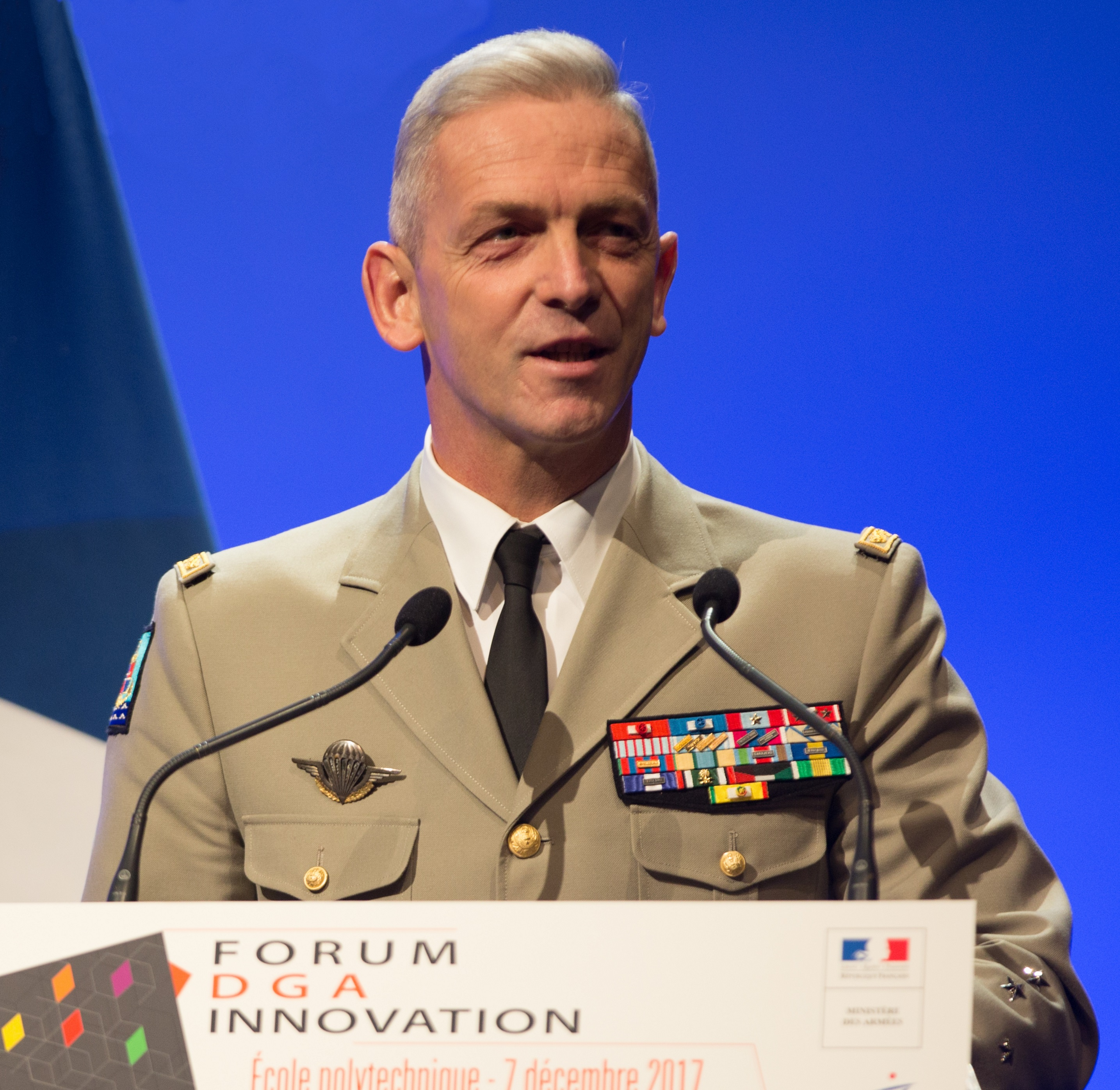 Visite du Général d'armée François Lecointre, chef d'État-Major des armées (CEMA) à l'Ecole polytechnique à l'occasion du Forum 2017 de la DGA